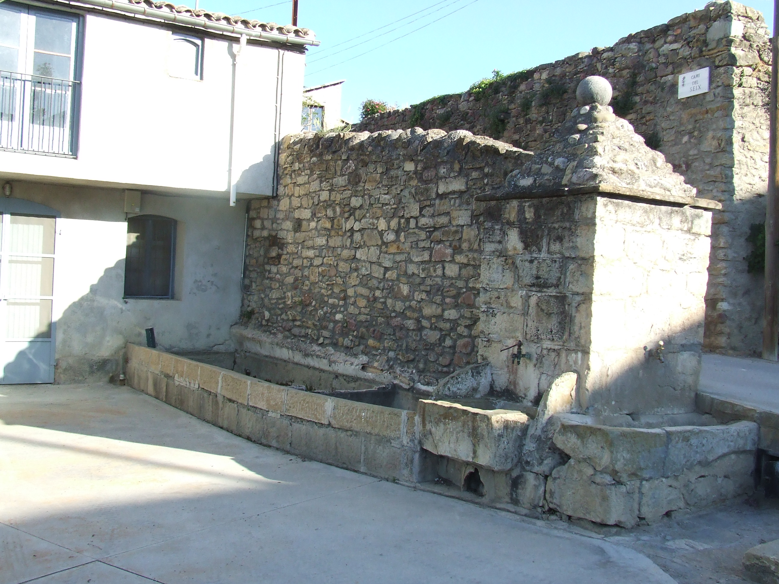 Font de Capdevila, a Salàs de Pallars.